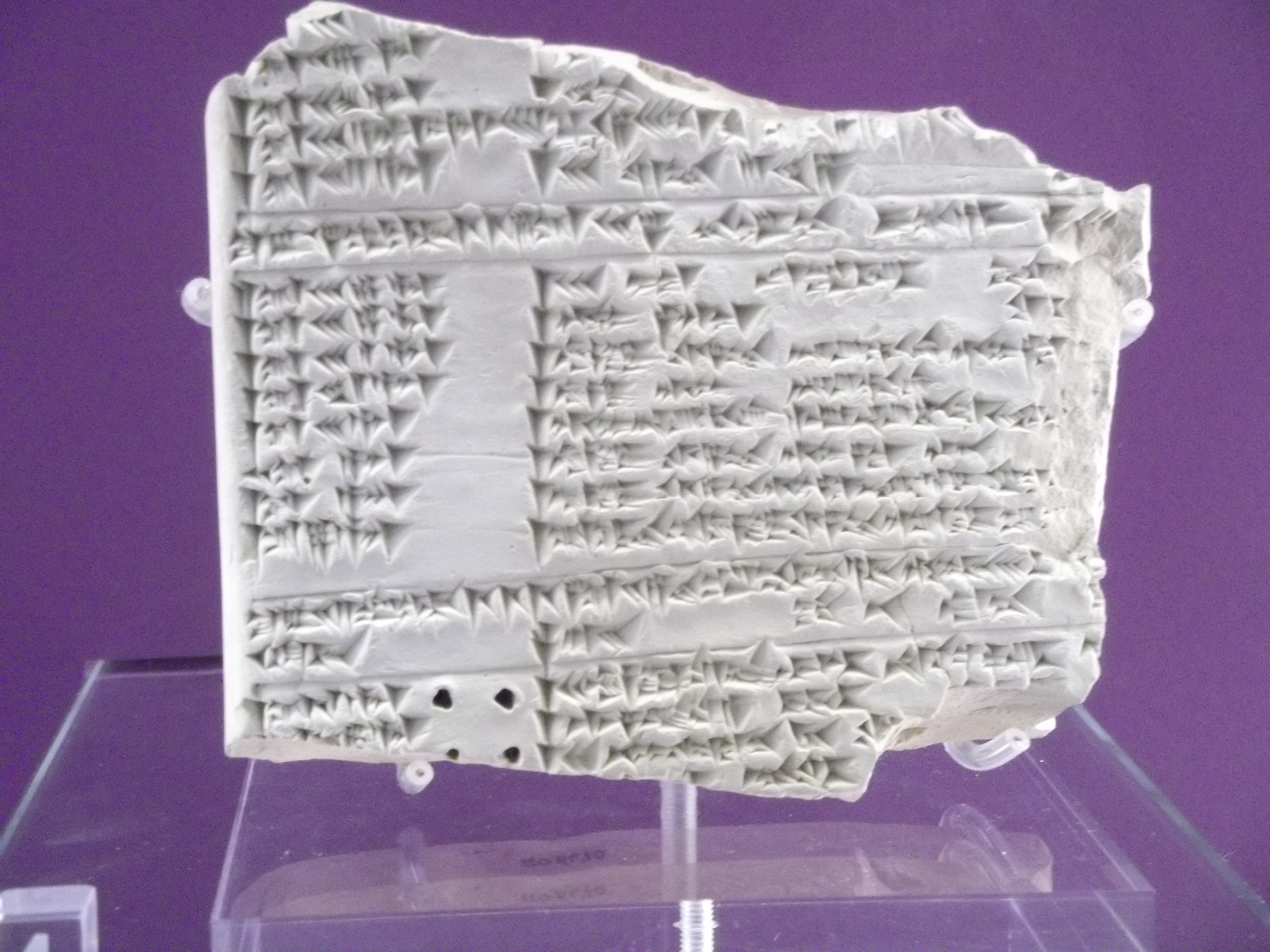 weiteres Fragment des Berichts über die Mondfinsternis von 194 v. Chr., Uruk